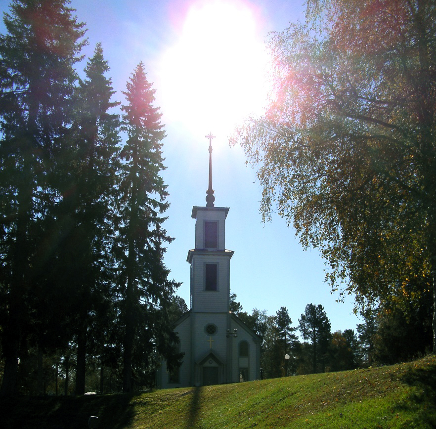 Korpilombolo kyrka